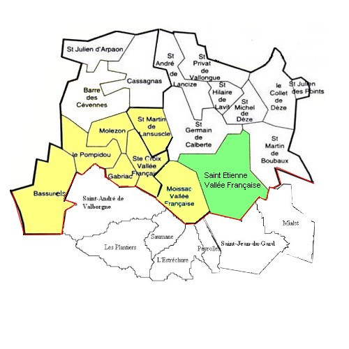 St Etienne Vallée Française dans les cantons de St Germain de Calberte, de Barres des Cévennes, de Saint Jean du Gard et de Saint-André de Valborgne. En jaune les autres communes de la communauté de communes de la Cévennes des Hauts-Gardons.